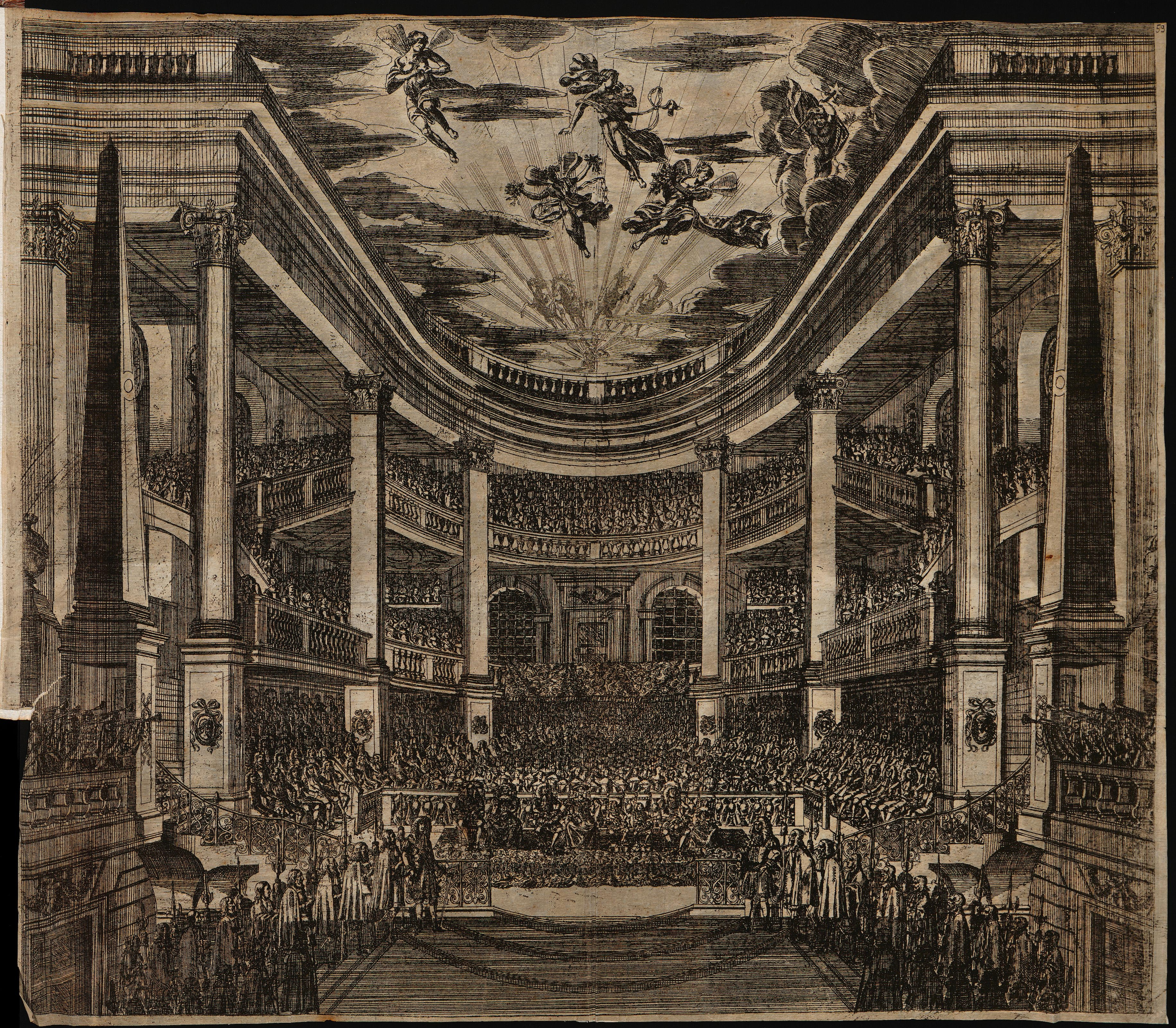 Grafik aus dem Klebeband Nr. 15 der Fürstlich Waldeckschen Hofbibliothek Arolsen Motiv: Dresden, Inneres des Opernhauses am Taschenberg, 1678, aus dem Textbuch des Balletts "Von Zusammenkunft und Wirkung der VII Planeten"